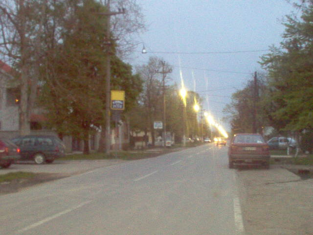 Главна улица у Бољевцима. Фотографисано са центра ка Београду.